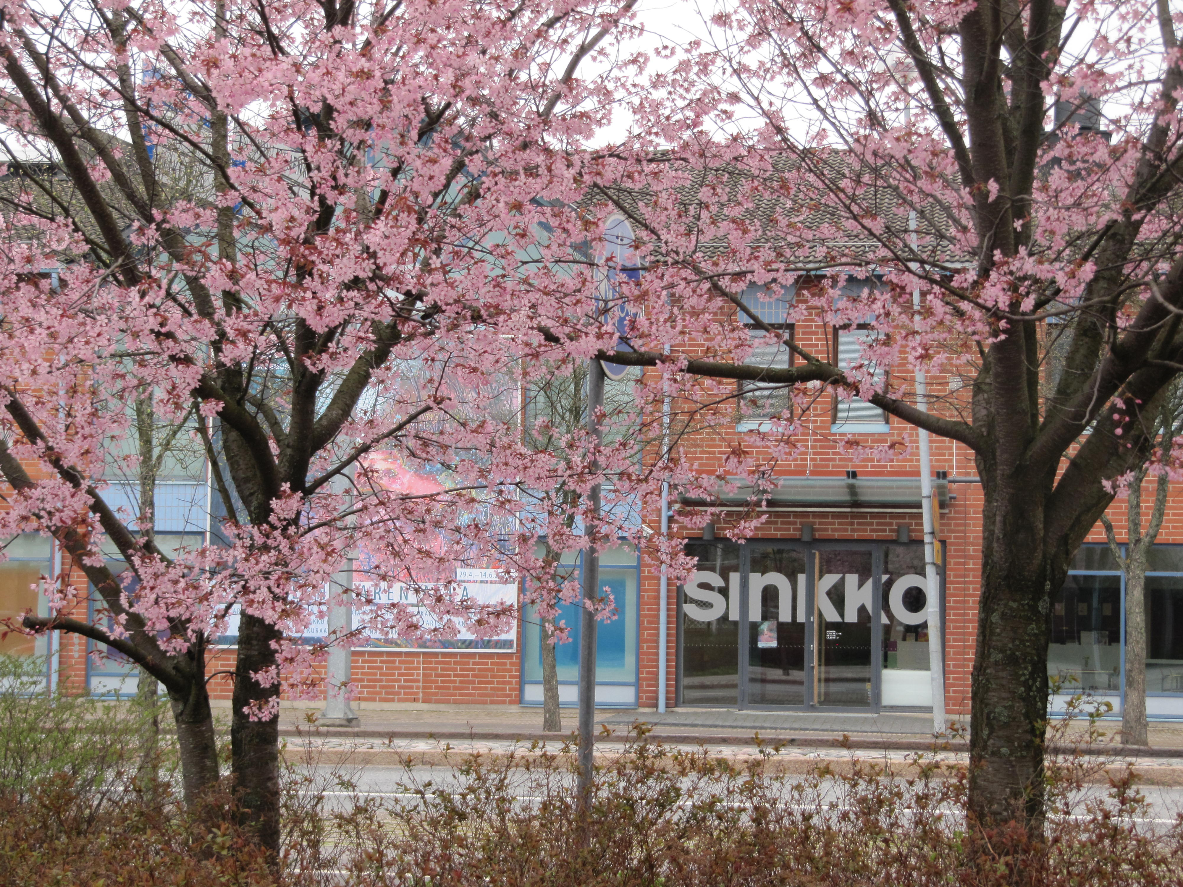 Keväällä Keravalla kukkivat kymmenet rusokirsikkapuut